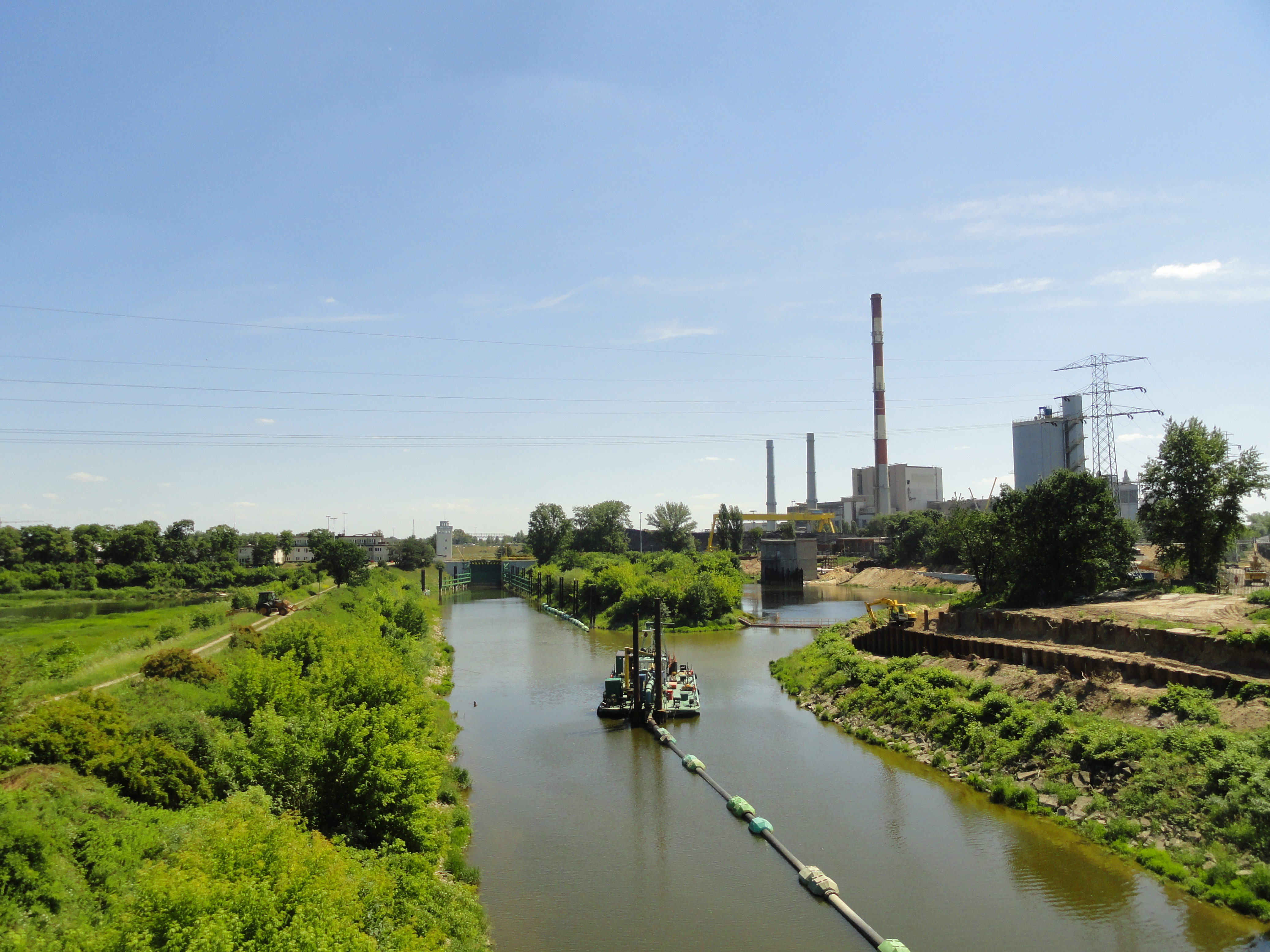 Widok z kładki Żerańskiej w Warszawie na Kanał Żerański przy elektrociepłowni.